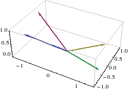 Gráfica generada con WolframAlpha